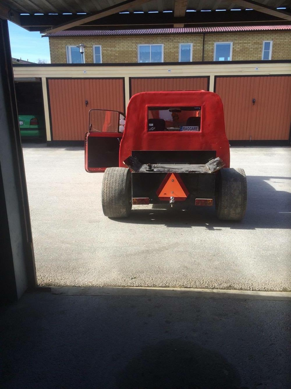 Eskedahls epa. Basead på Volvo Duett.